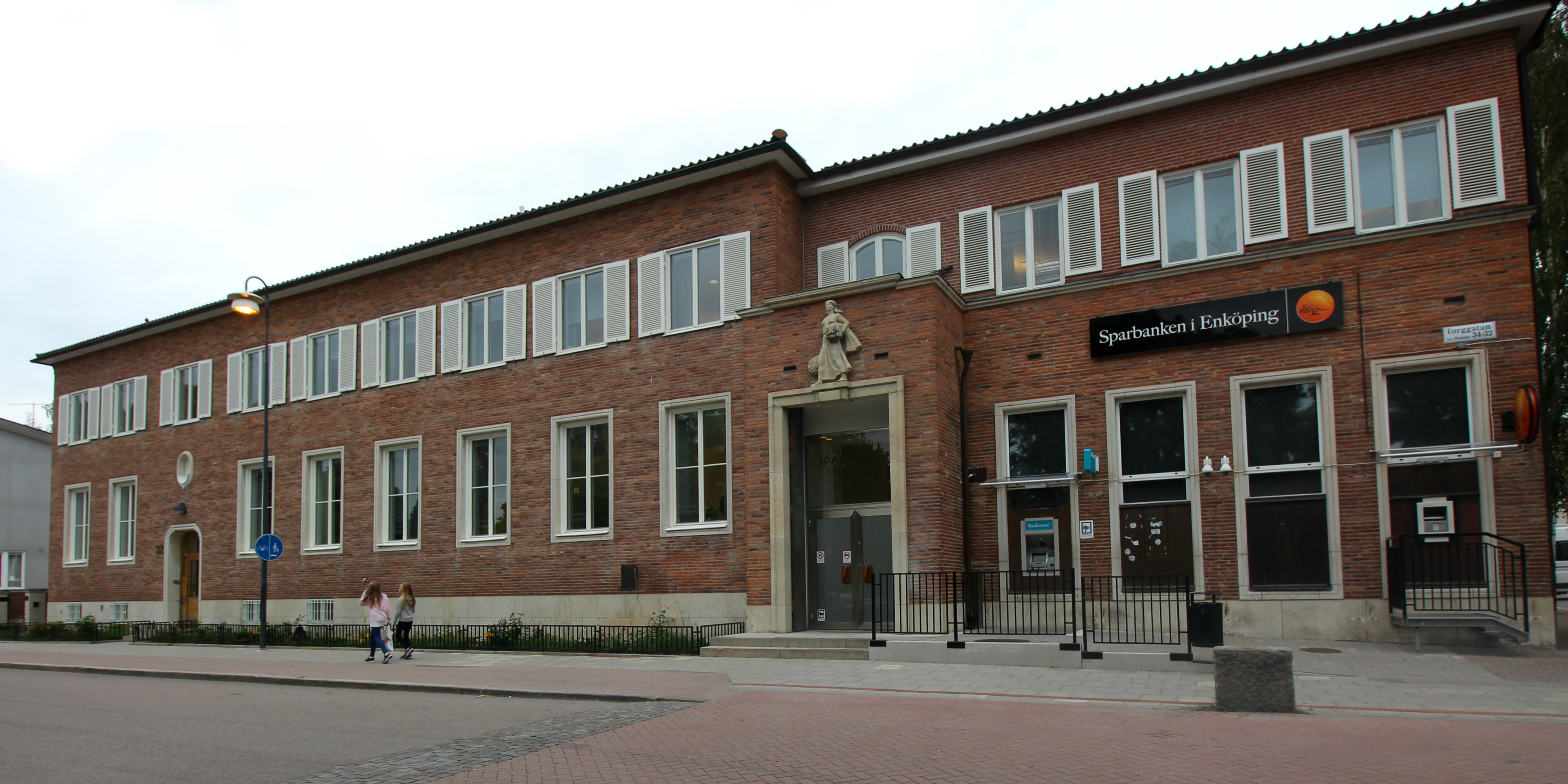 Sparbankshuset i Enköping, Torggatan / Västra Ringgatan. Uppfört 1942-1944. Arkitekt: Ivar Tengbom.